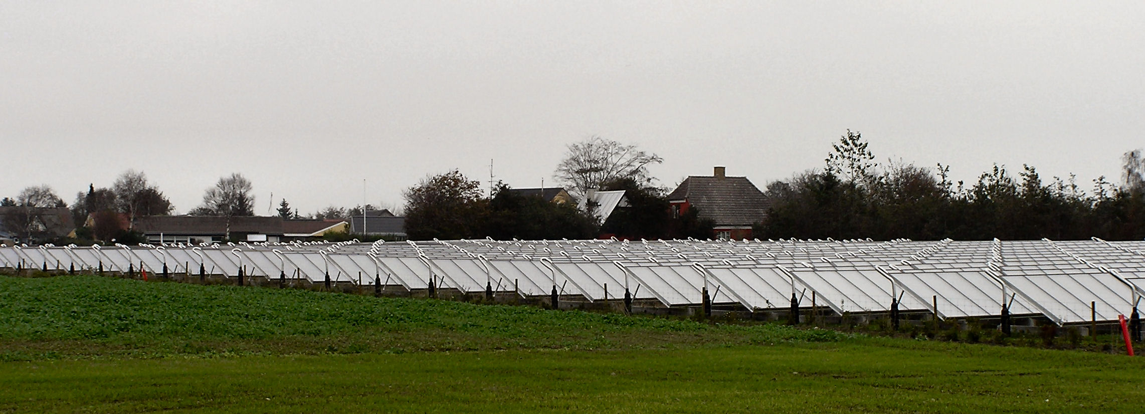 Ulsted Solar Energy System, Denmark